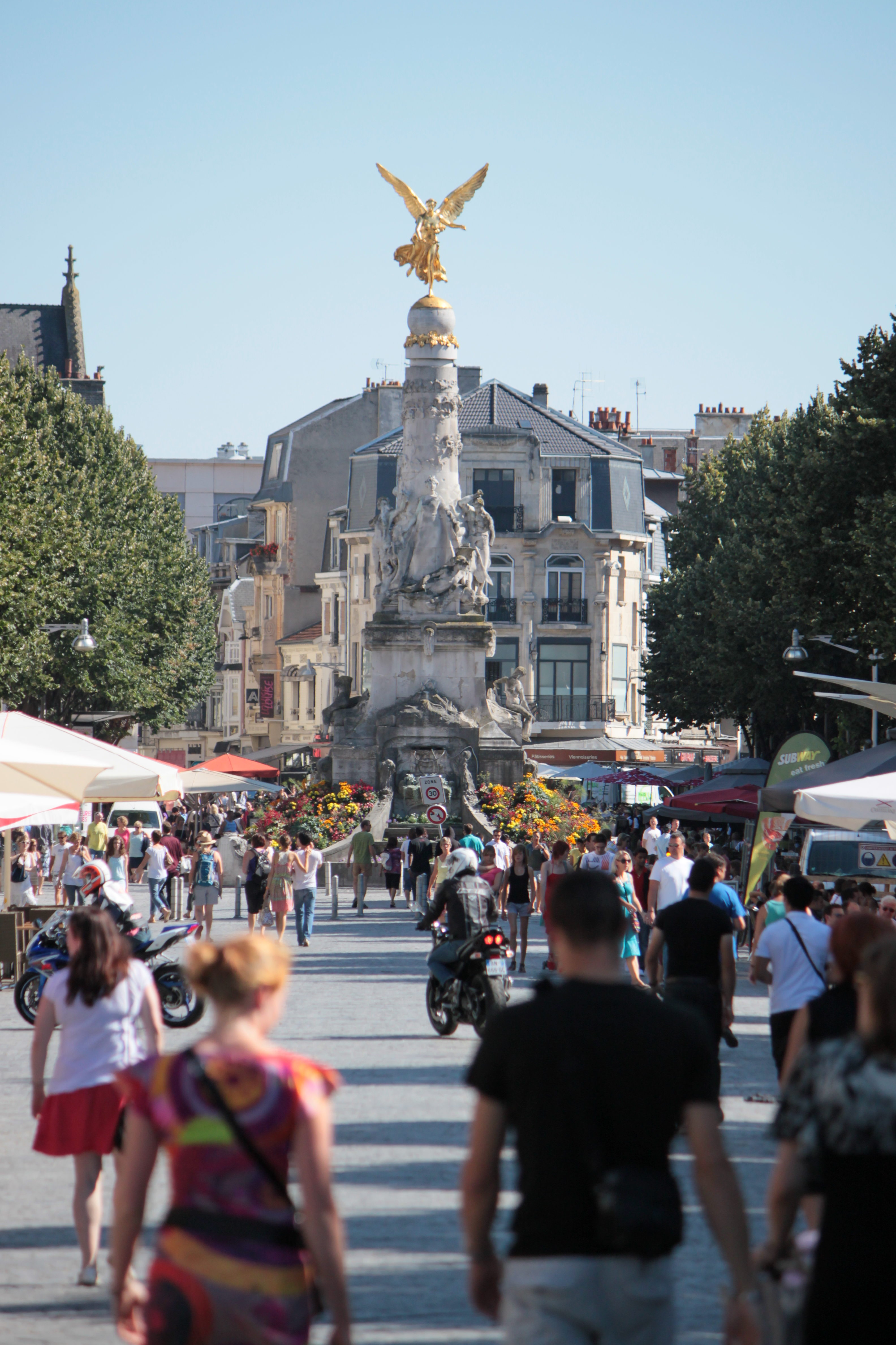 La fontaine Subé de Reims (Champagne-Ardenne, France).